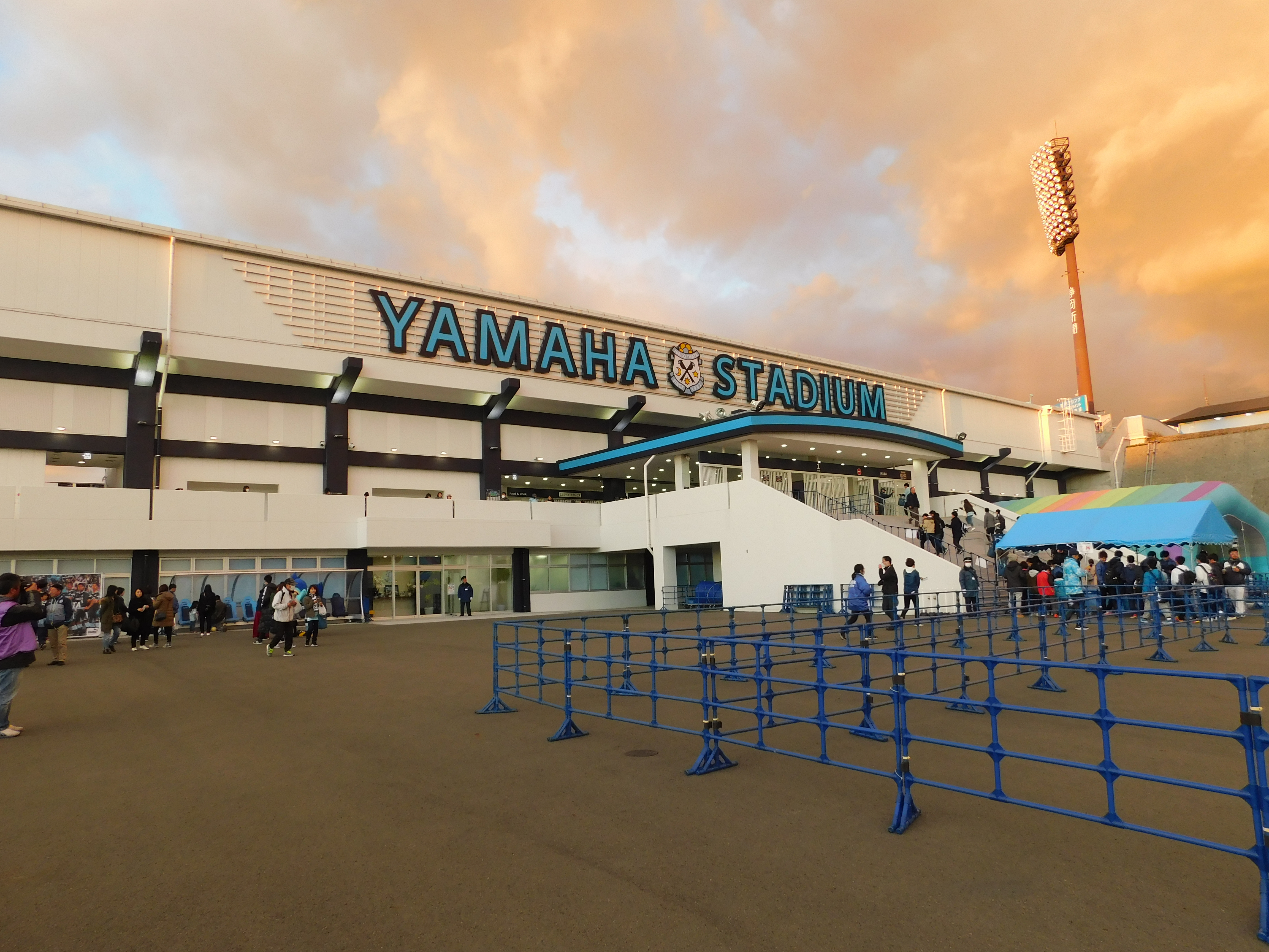 2017年3月15日 ヤマハスタジアム南側スタンド。スタジアムの外より撮影。